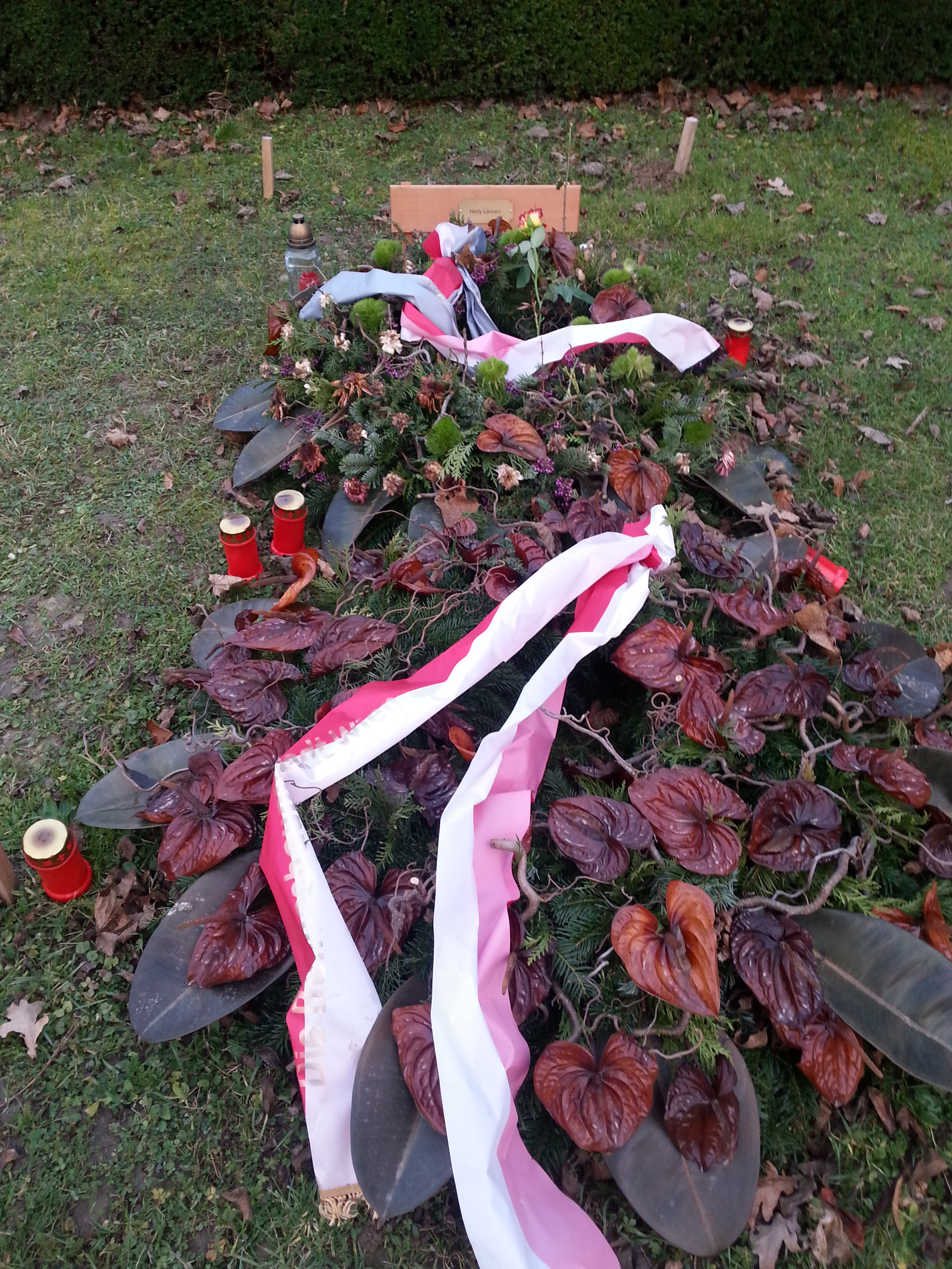 Grab von Hedy Lamarr auf dem Wiener Zentralfriedhof, Gruppe 33 G, Grab Nr. 80 (Dez. 2014)